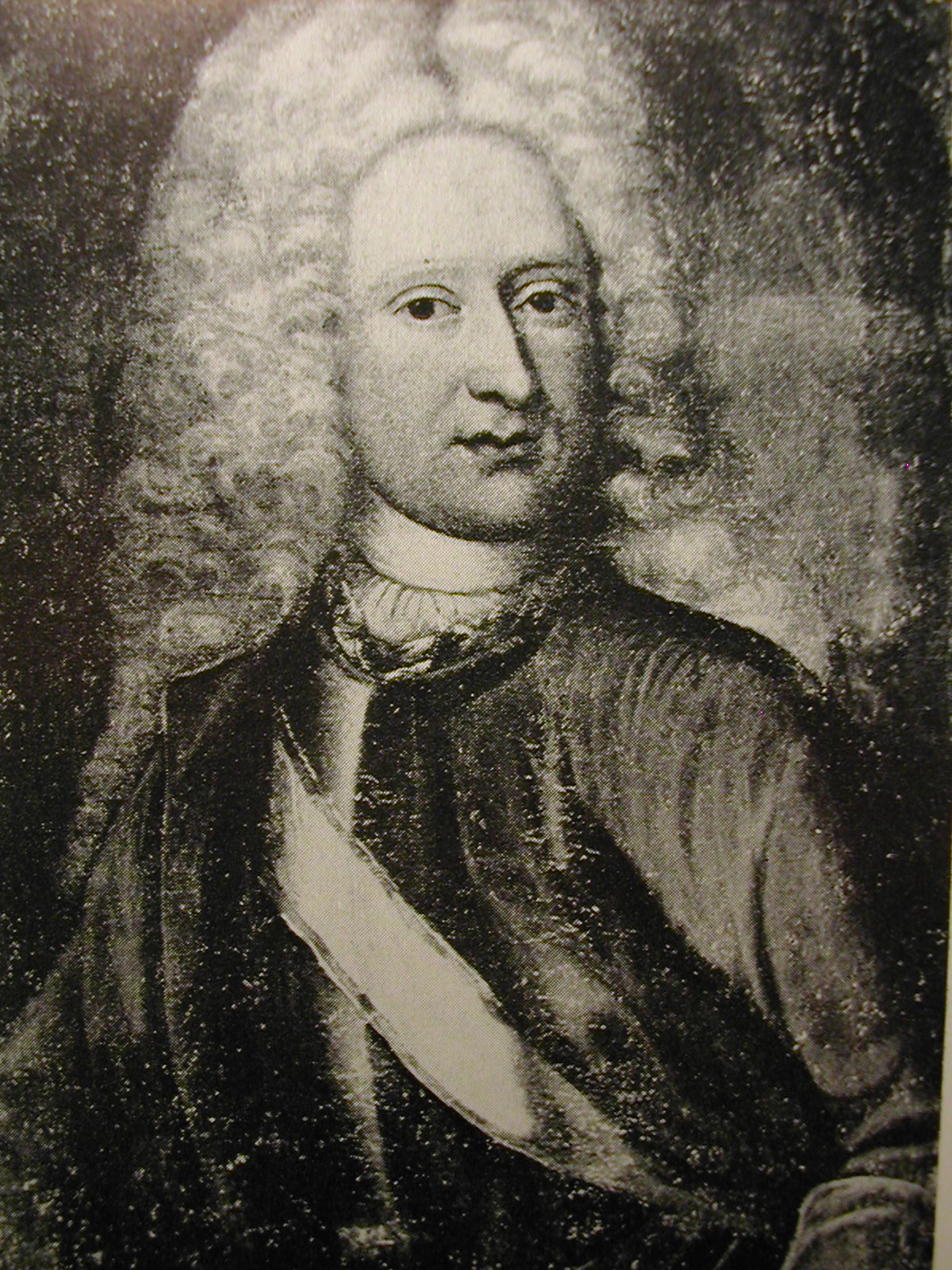 Ulrik Frederik de Cicignon (1698-1772). General og stiftamtmann.